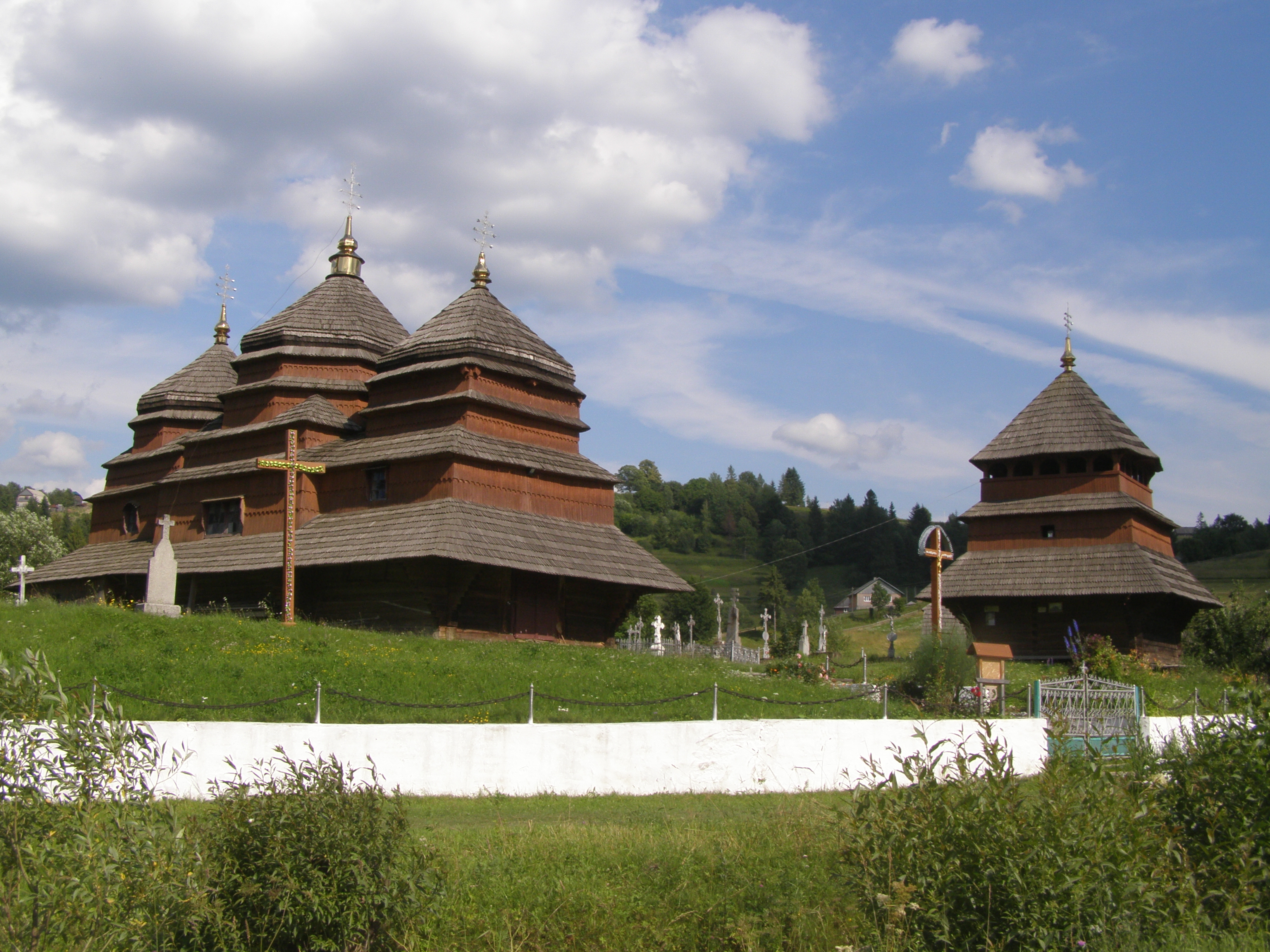 Церква Зіслання Святого Духа (1804) і дзвіниця. Село Верхня Рожанка. Фольклористична експедиція "Бойківщина – 2018" Кафедри української фольклористики Львівського університету імені Івана Франка